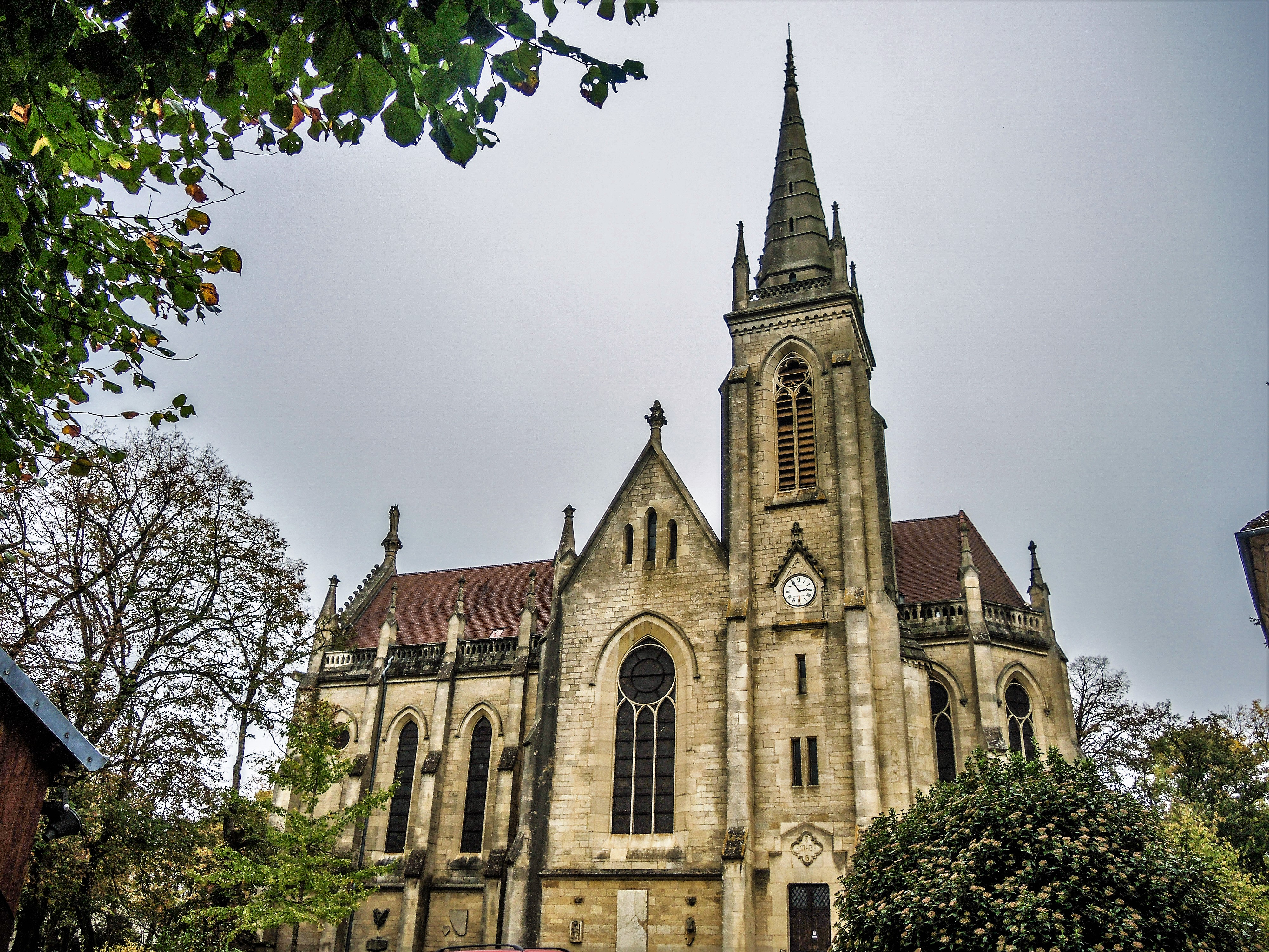 Basilique Notre-Dame du mont Roland. Jouhe . Juta.